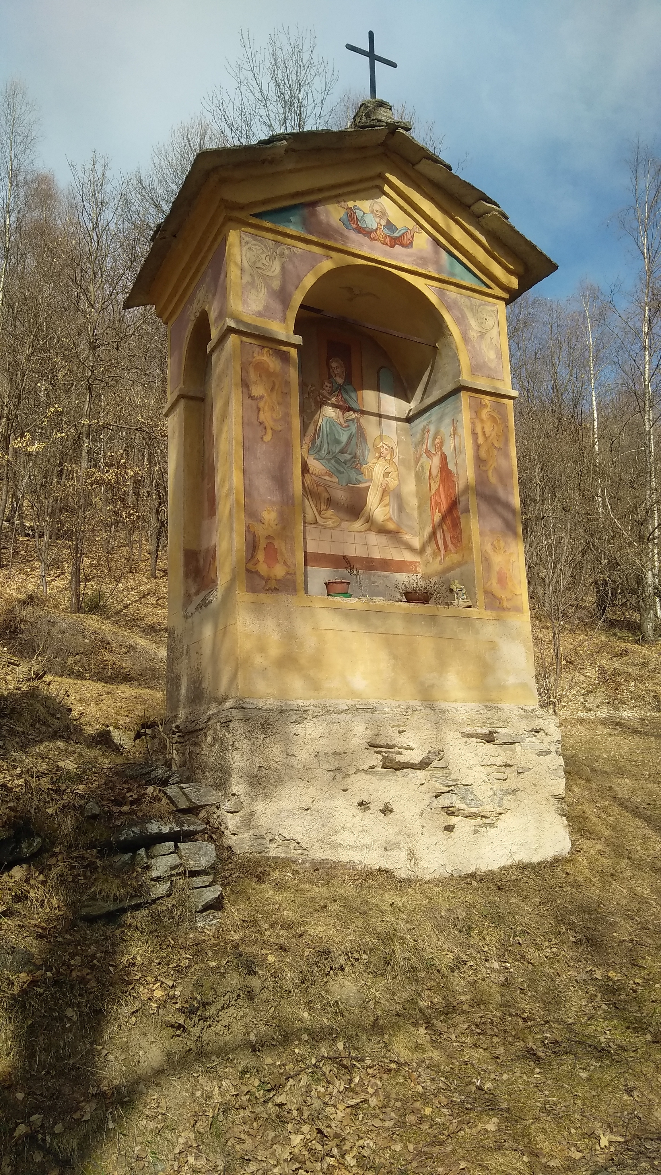 Santuario della Madonna della Betulla (Val Variata, CN): pilone votivo nei pressi della chiesa